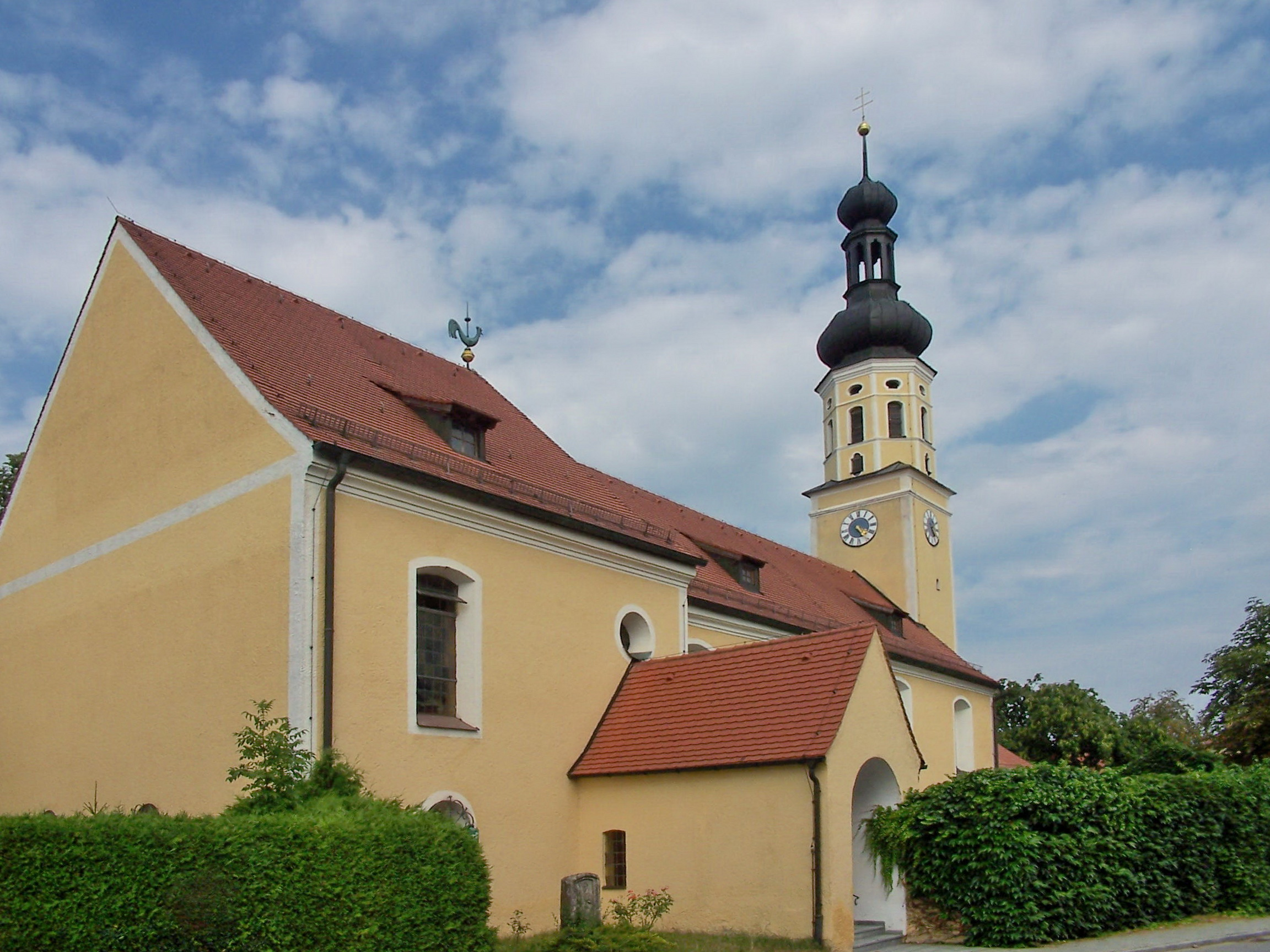 Barbing, Illkofen, Uferstraße 1. Katholische Pfarrkirche St. Martin, Saalbau mit eingezogenem Chor und Ostturm, romanisch, Langhaus und Turmerhöhung Ende 17. Jahrhundert, Umbauten 1. Hälfte 18. Jahrhundert, 1933 Erweiterung; mit Ausstattung; Friedhofsmauer, 17./18. Jahrhundert.